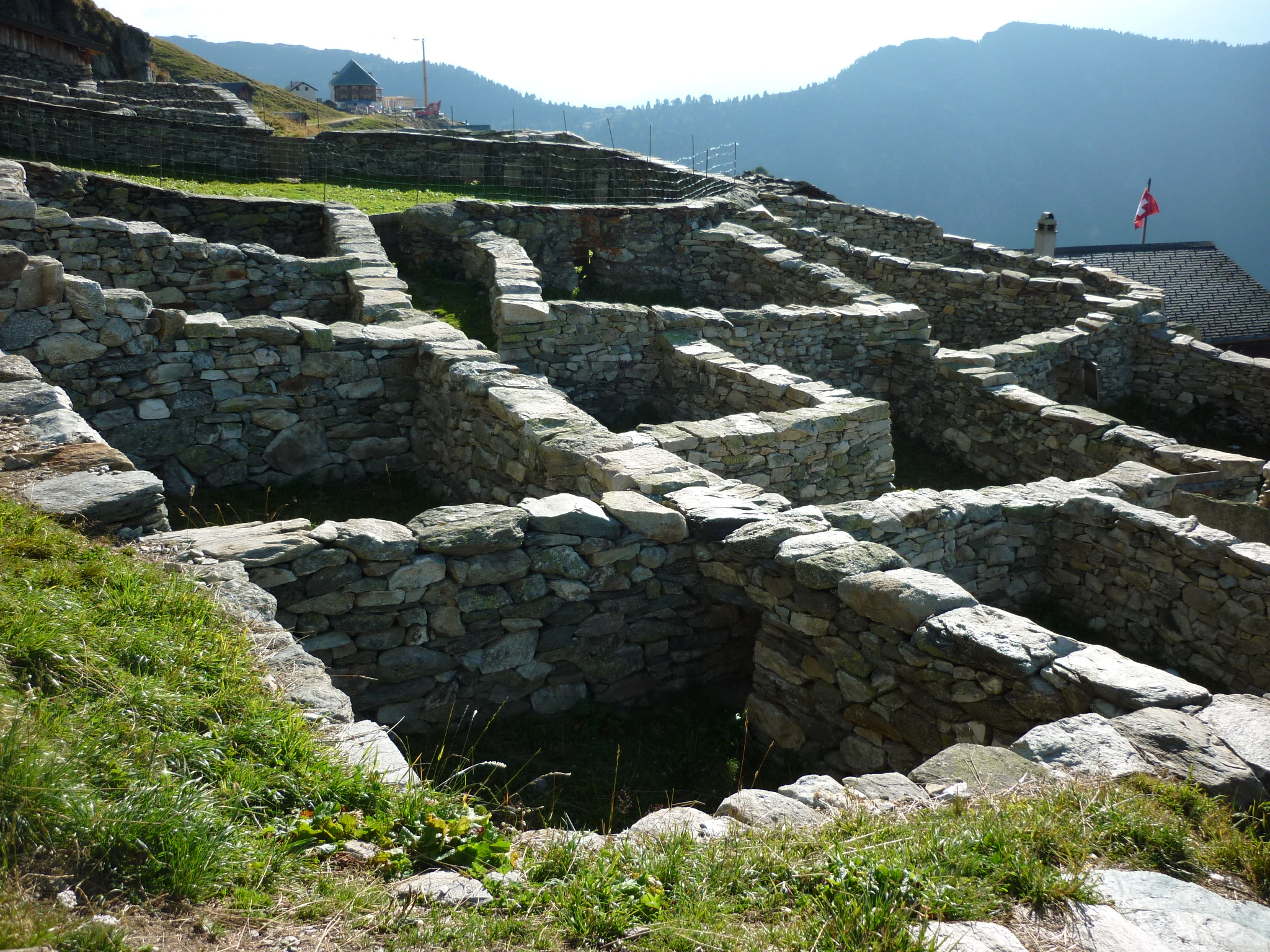 "Färricha", Belalp, Naters VS, Schweiz